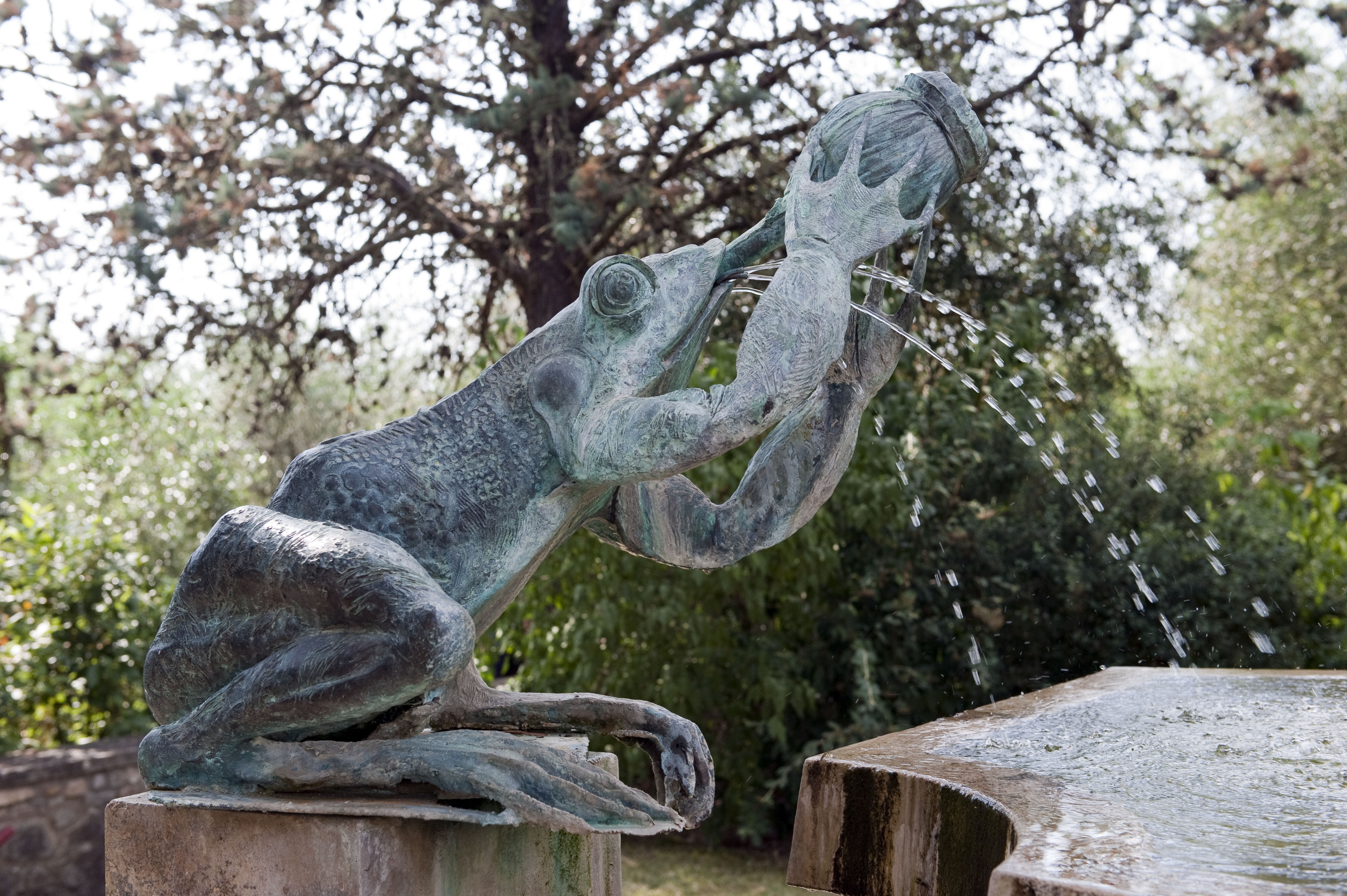 Fontana della Rana beona, San Sano, Gaiole in Chianti